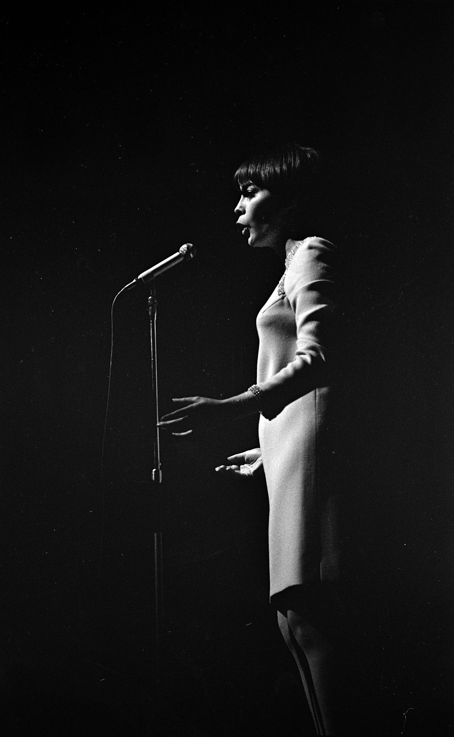 Palais des Sports. Le 4 Novembre 1966. Vue de Mireille Mathieu sur la scène du Palais des Sports. Le récital eu lieu le 5 novembre 1966.